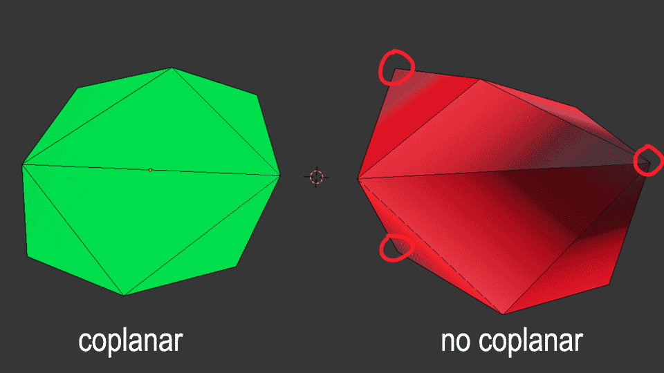 Ejemplos de polígonos coplanares y no coplanares en 3D, concretamente en box modelling